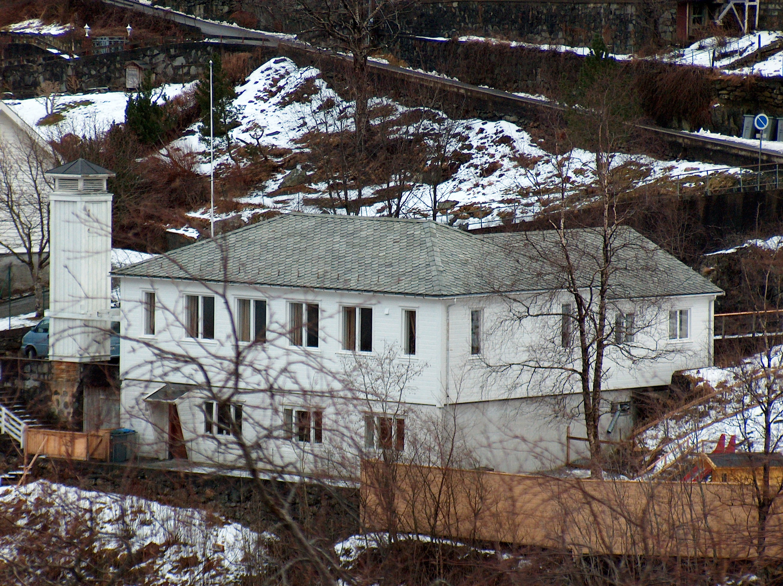 Trengereid bedehuskapell